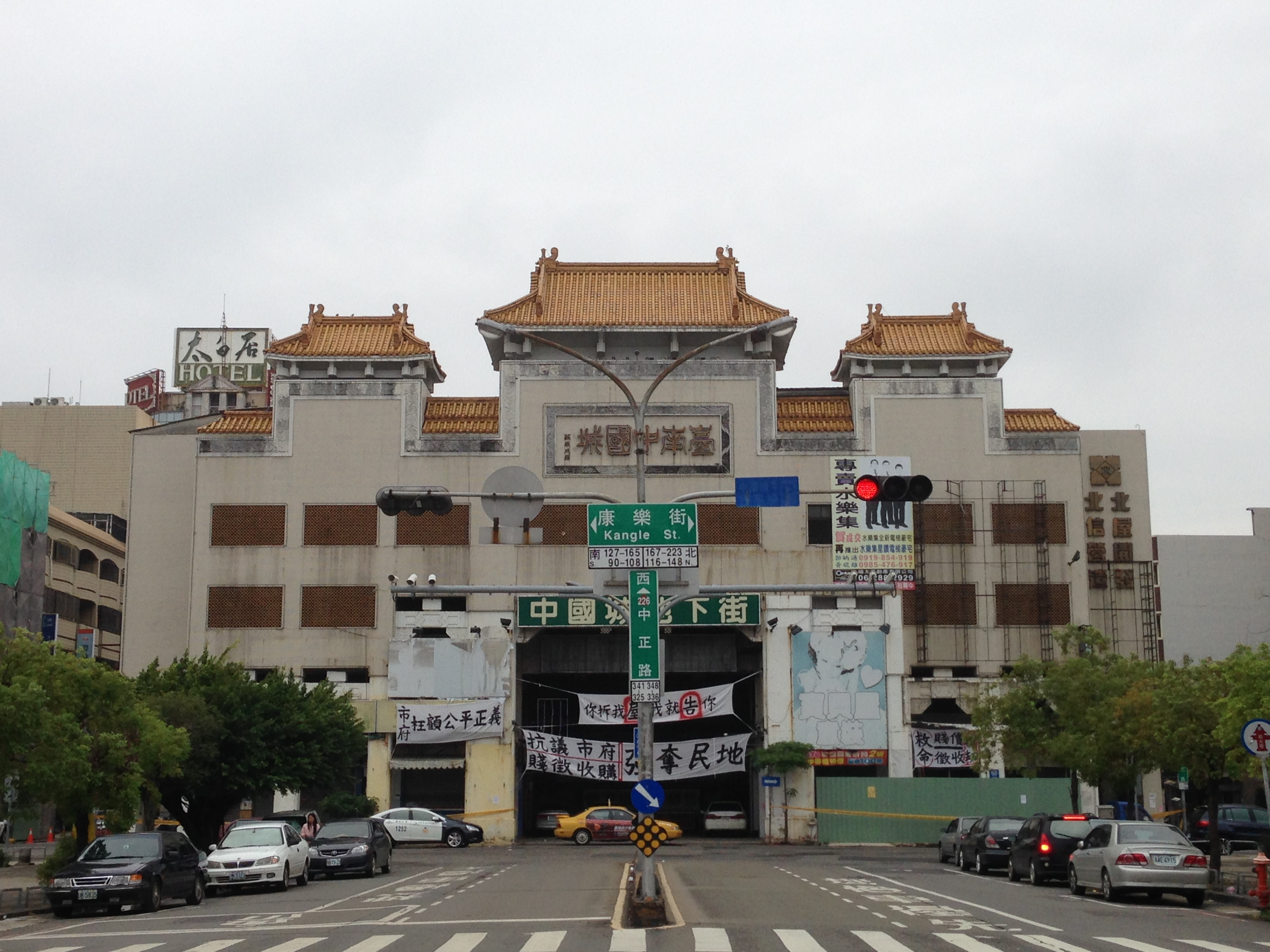 中文（台灣）: 懸掛抗議布條的台南中國城